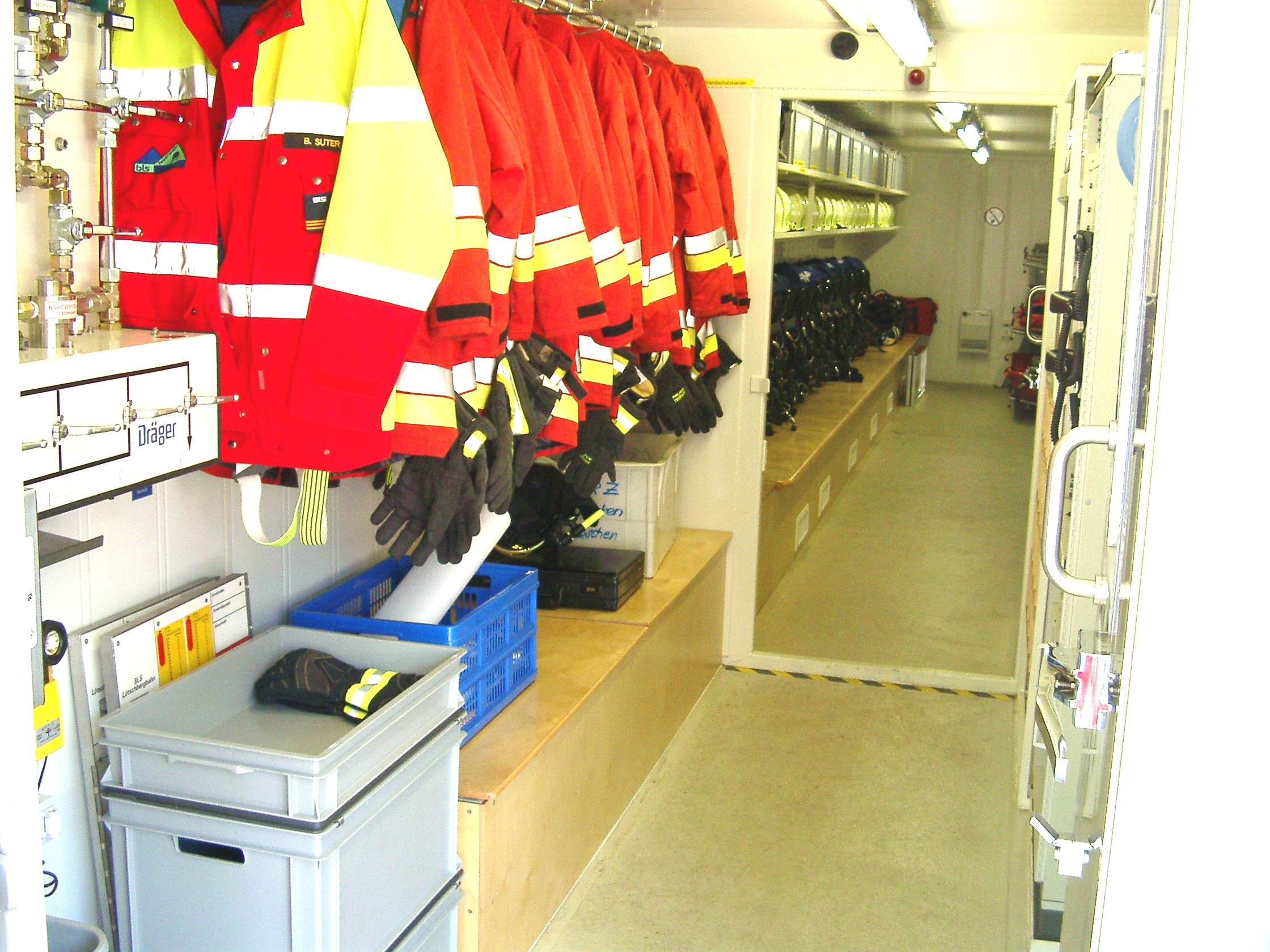 Lösch- und Rettungszug der BLS: Rettungsfahrzeug II innen